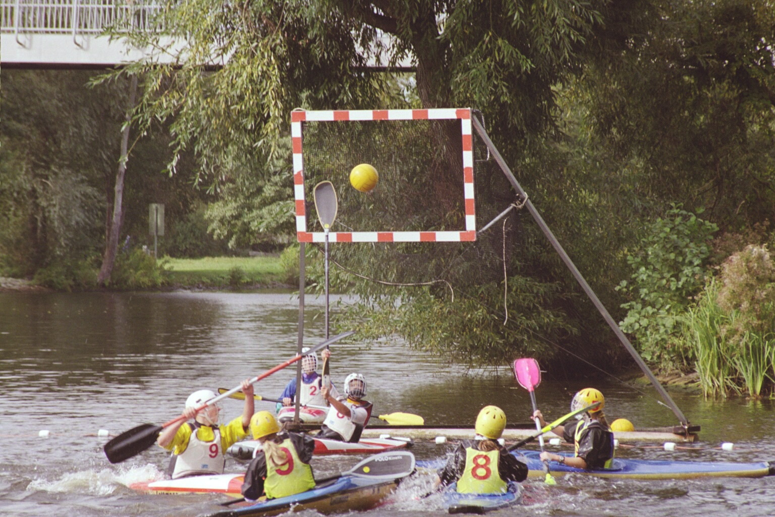 Description: Canoe polo Beschreibung: Kanupolo-Spieler beim werfen auf's Tor